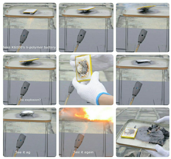 باتری ای که دارای حاشیه زرد رنگ باتری لیتیوم-پلیمر است که پس از تحمل حرارت به مدت 26 ثانیه و بدون تغییر حجم قابل توجهی و خیلی ایمن تر نسبت به باتری لیتیوم-یون سوخت و بدون تاثیری به محیط بعد از واکنش اولیه(سوختن) تا هزار درجه سانتی گراد دما را تحمل کرد و ذوب نشد. ولی باتری لیتیوم-یون پس از 13 ثانیه که در معرض حرارت قرار داشت بشدت افزایش حجم پیدا کرد و به صورت شاید مرگبار منفجر شد.